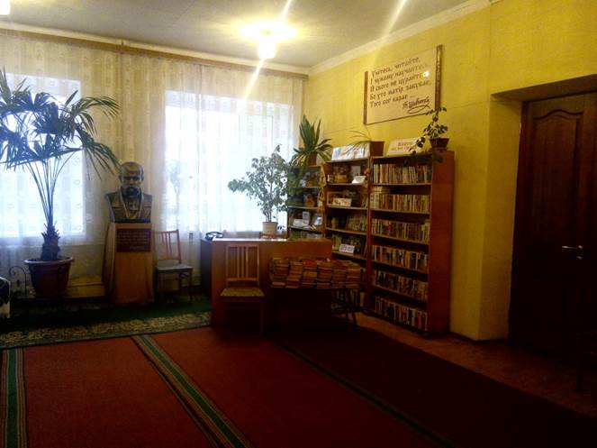 Абонемент бібліотеки для дорослих